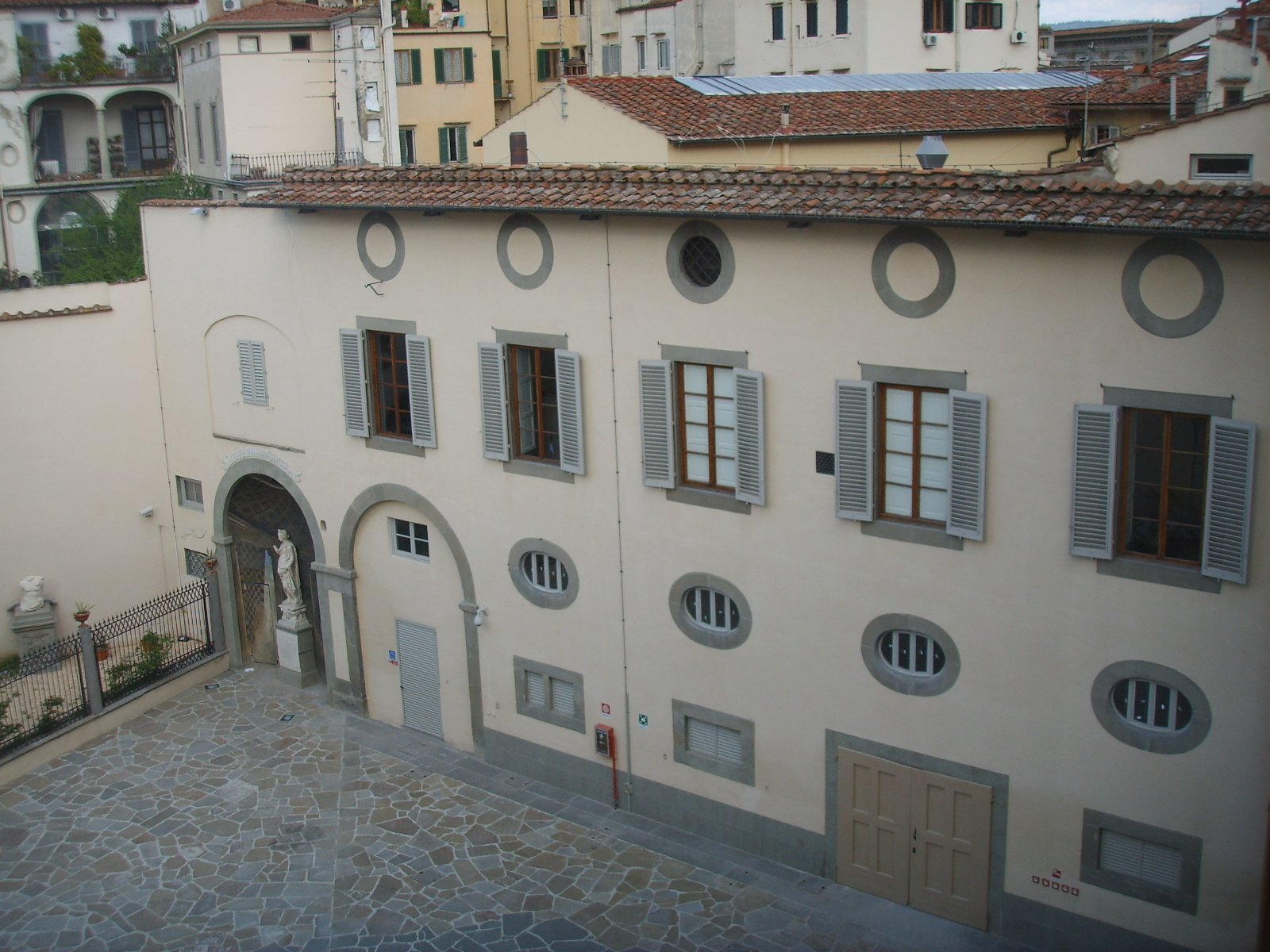 Palazzo sacrati, cortile